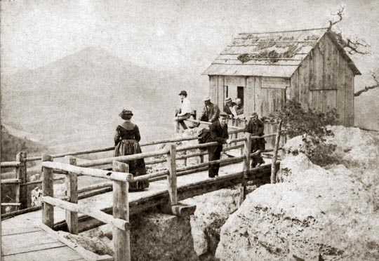 Jetřichovické stěny, Vilemínina stěna - vyhlídka